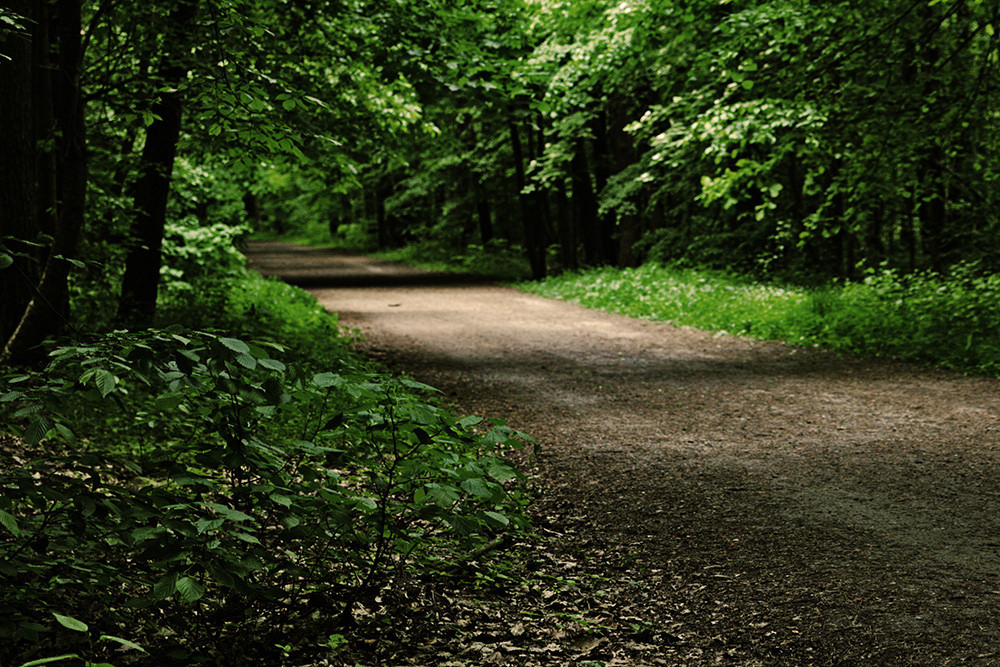 Las Kabacki